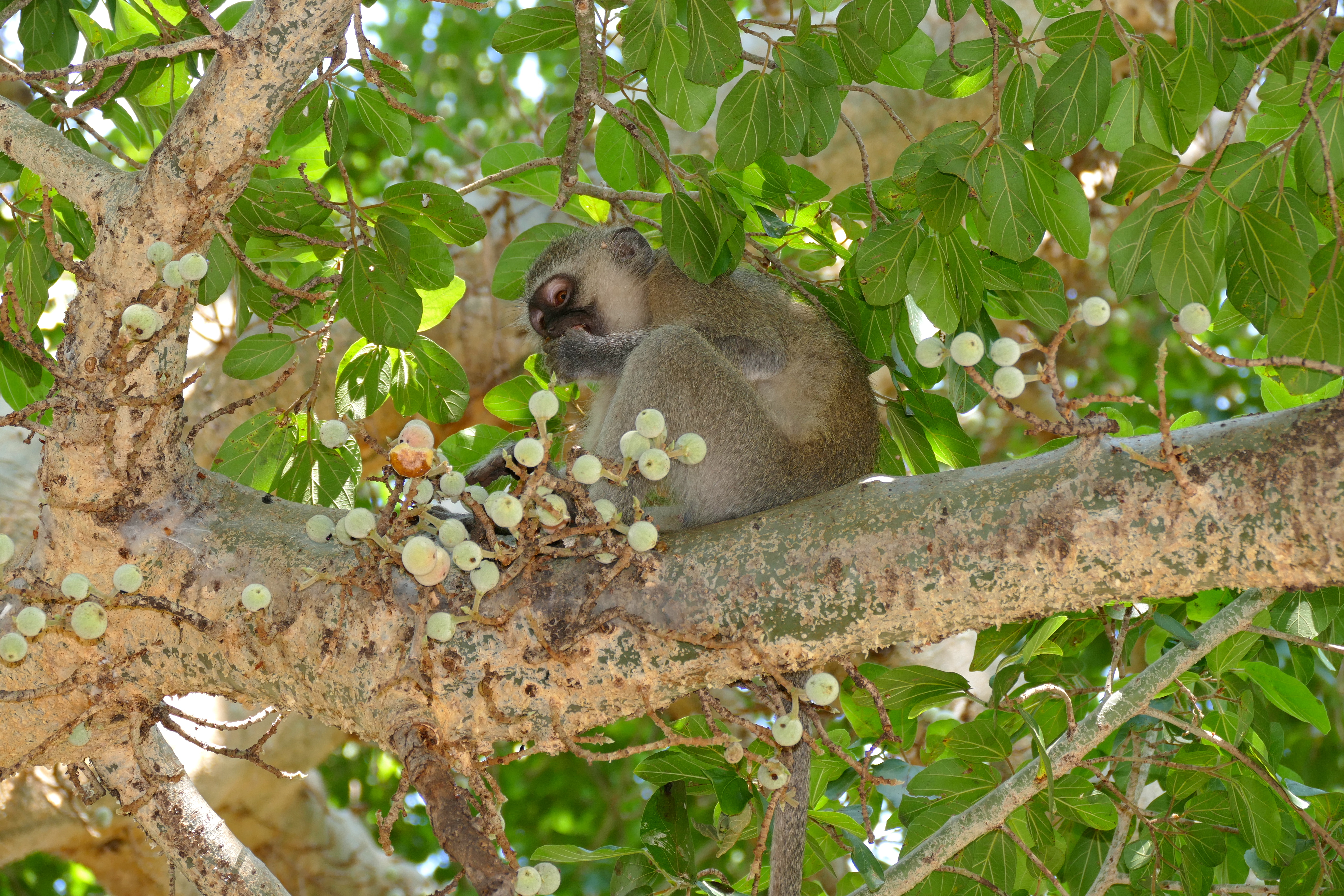 Letaba Camp, Kruger NP, SOUTH AFRICA